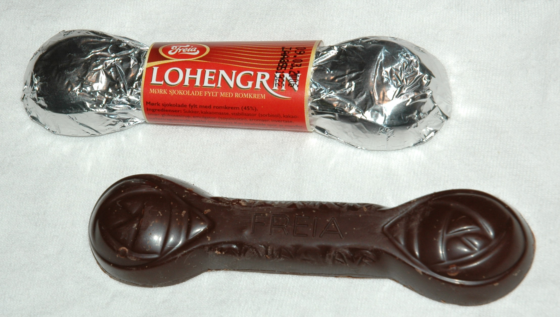 Lohengrin sjokolade. Bilete teke av Kjetil Lenes